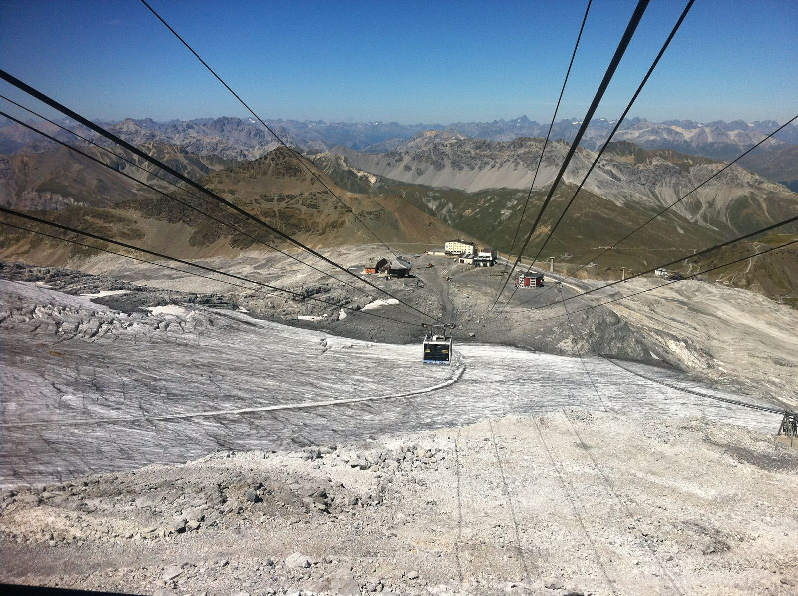 Seilbahn der Fa.Hözl zum Monte Livrio